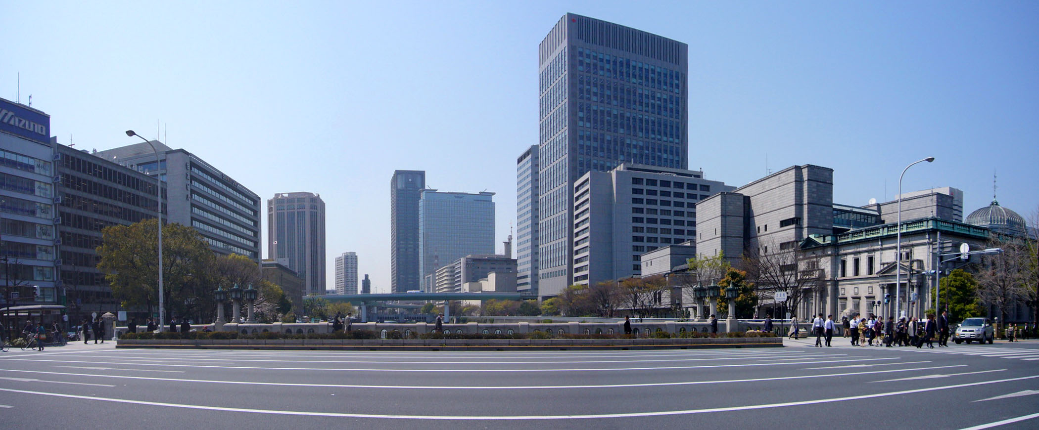 Yodoyabashi Bridge in Osaka, Japan